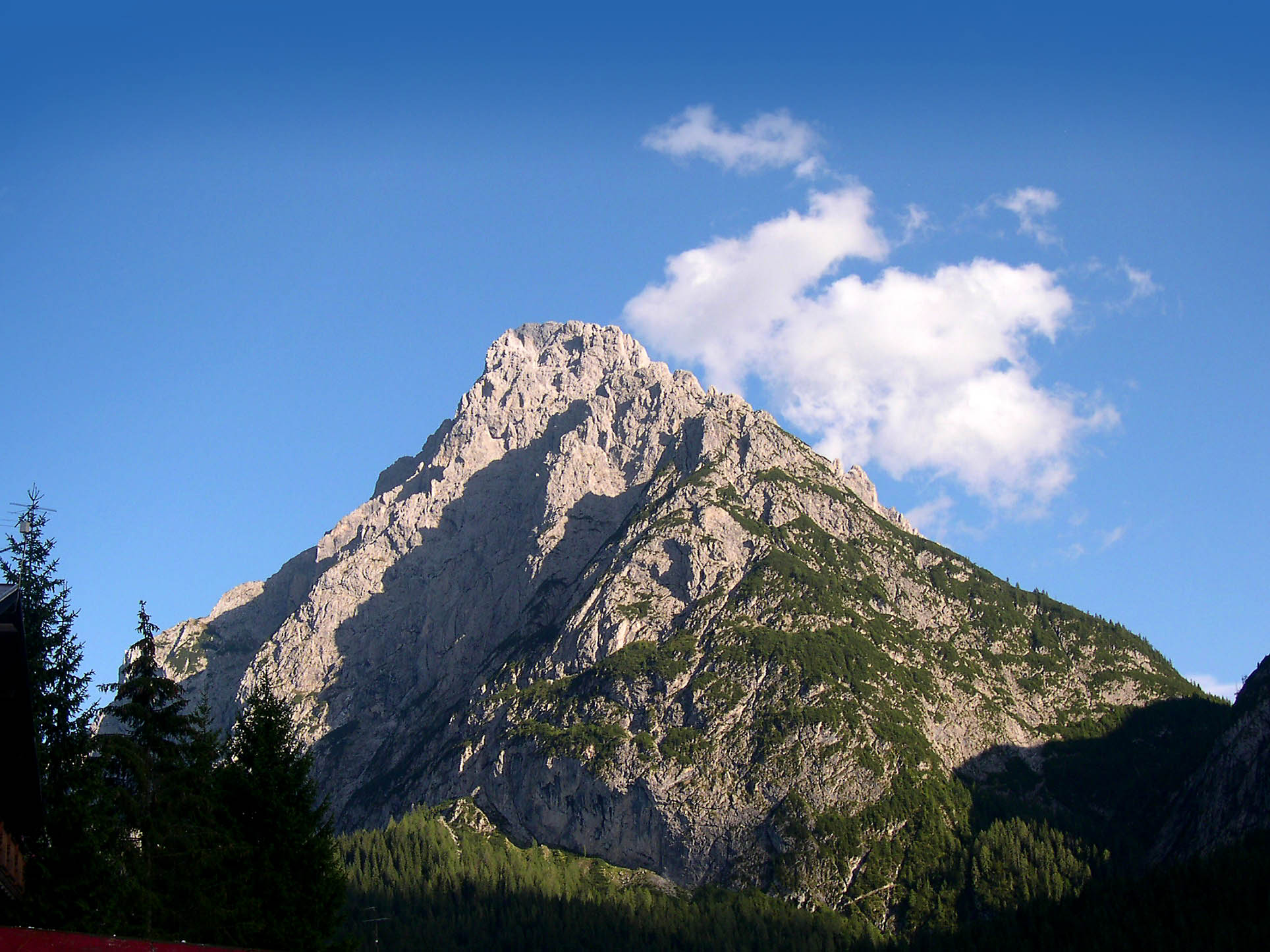 Versante Ovest del monte Siera (2.443 m)